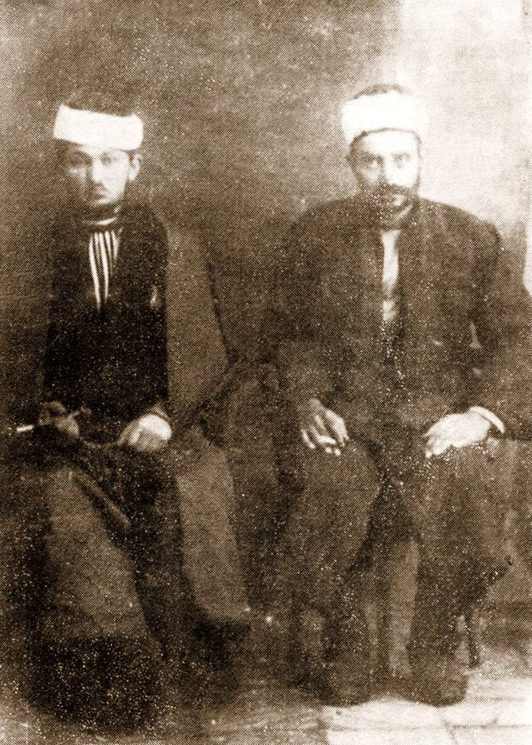 Лево седи народниот херој Жарко Зрењанин - Уча (1902-1942), сликан со оџата од Канатларци за време на неговото учителствување во Канатларци